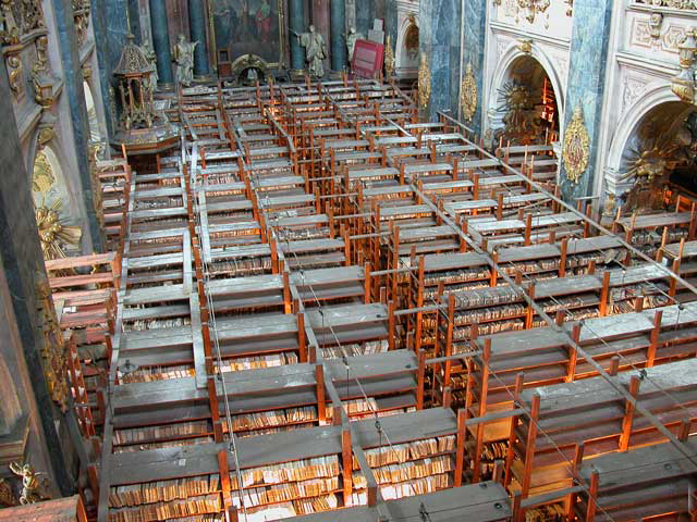 Lwów-kościół Jezuitów, w którym od 1945 r. przechowywane są zbiory prasy Ossolineum nie przekazane Polsce. Autorem zdjęcia jest Katarzyna Łebkowska. Marzec 2006.